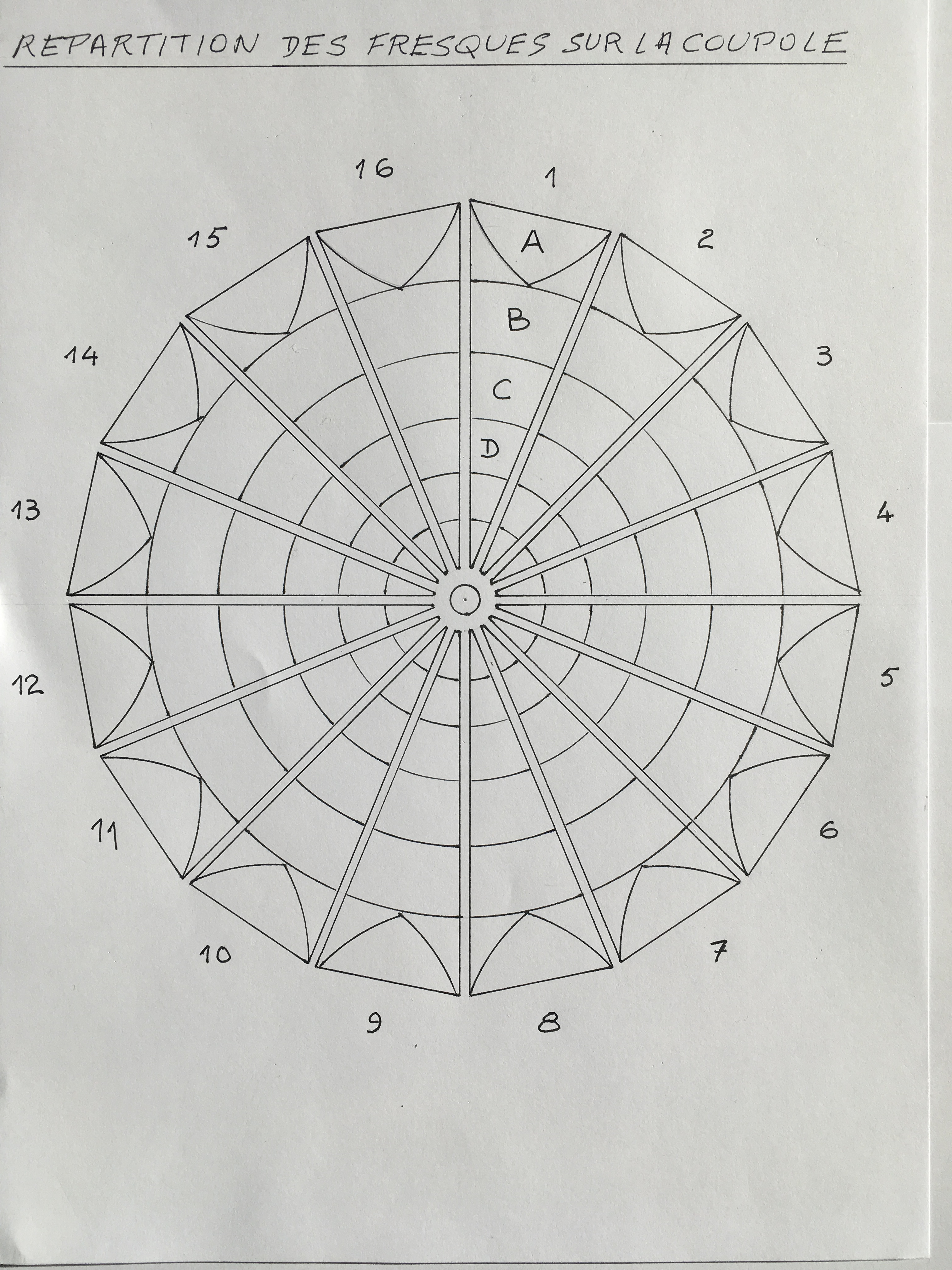 Disposition des fresques sur la coupole